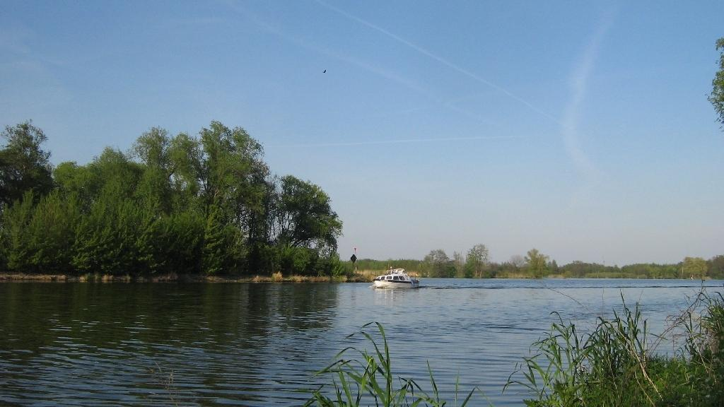 Die Havel bei Deetz (Groß Kreutz) (Brandenburg, Germany)